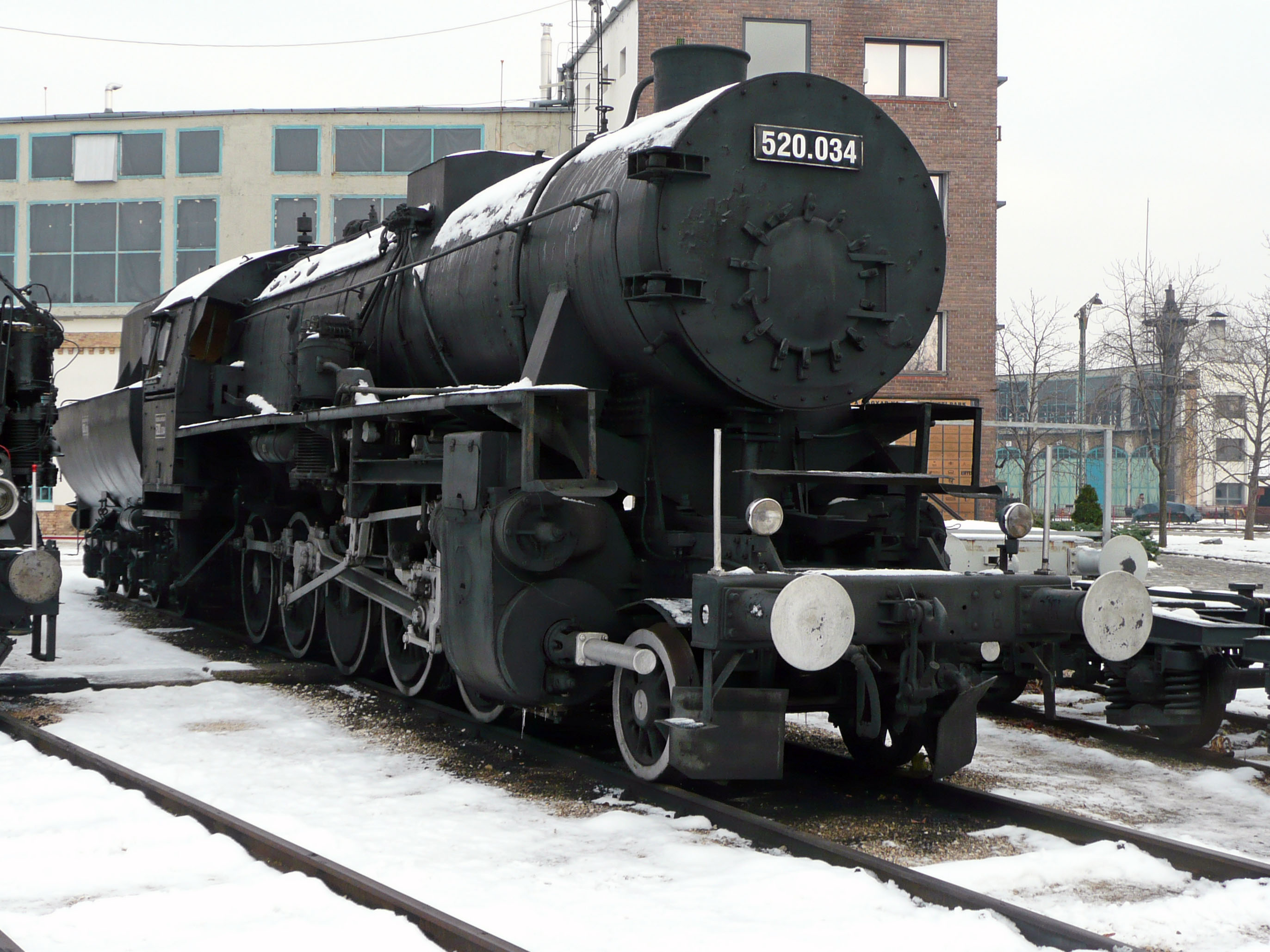 MAV 520.034 im Bahnpark Budapest. Die Lok wurde 1963 von der UdSSR verkauft und behielt die typisch sowjetische kleine Rauchkammertür.